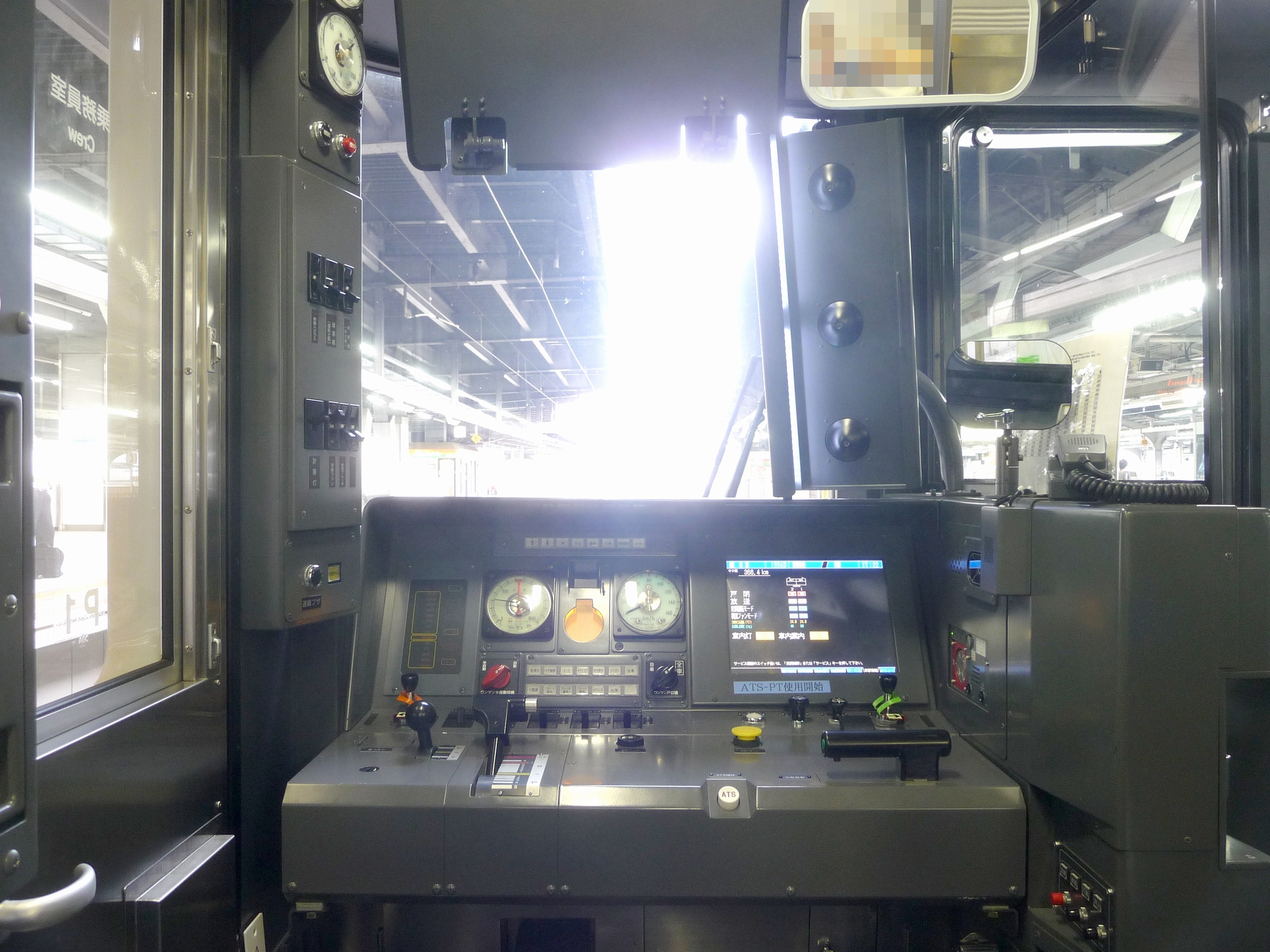 JR東海キハ25形気動車の運転台。